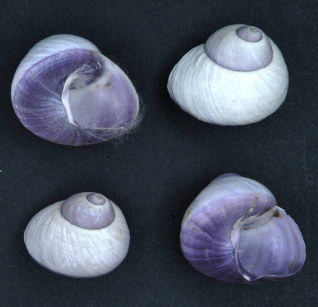 Janthina janthina (Linnaeus, 1758)